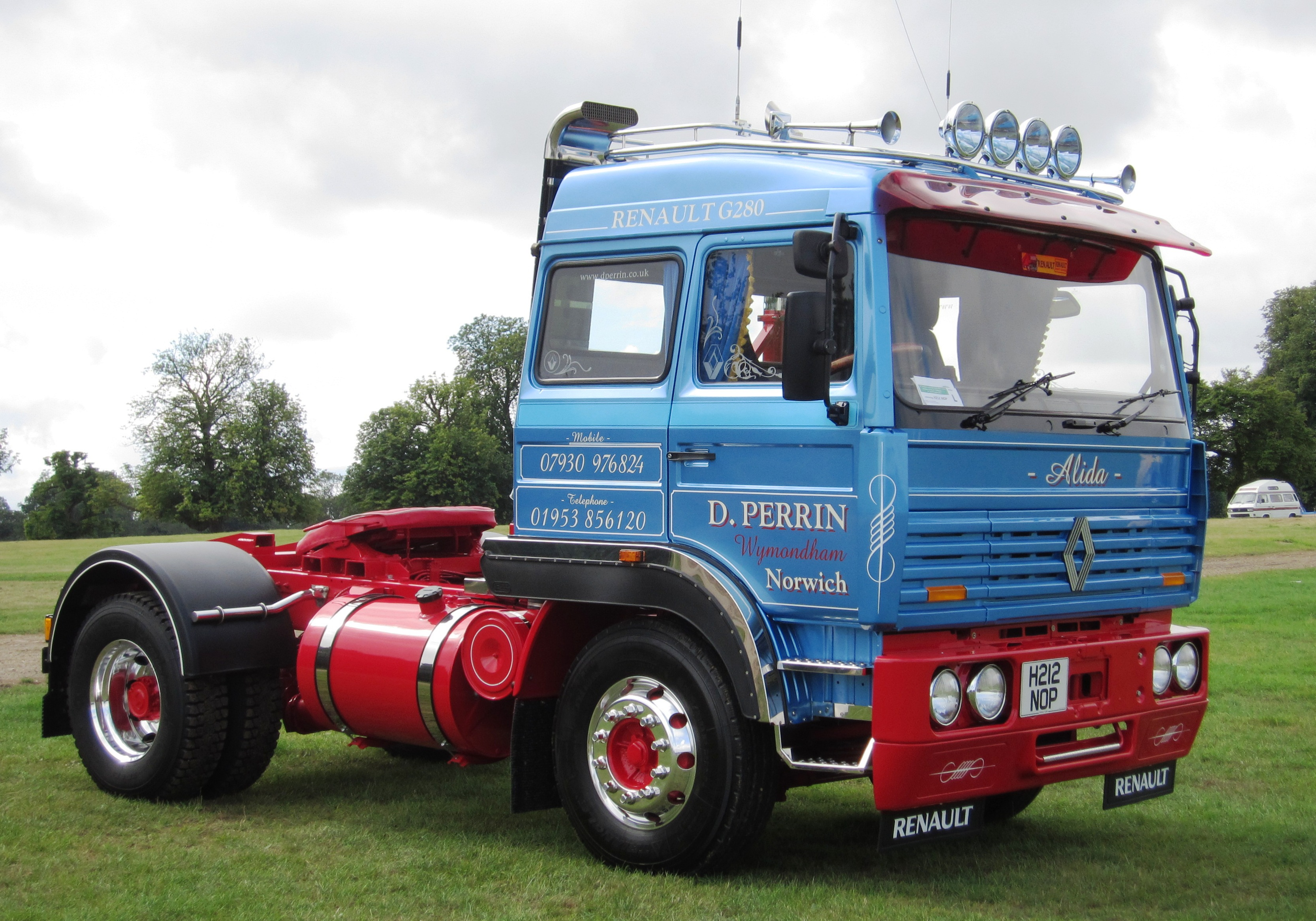 Renault Camion "G ..."